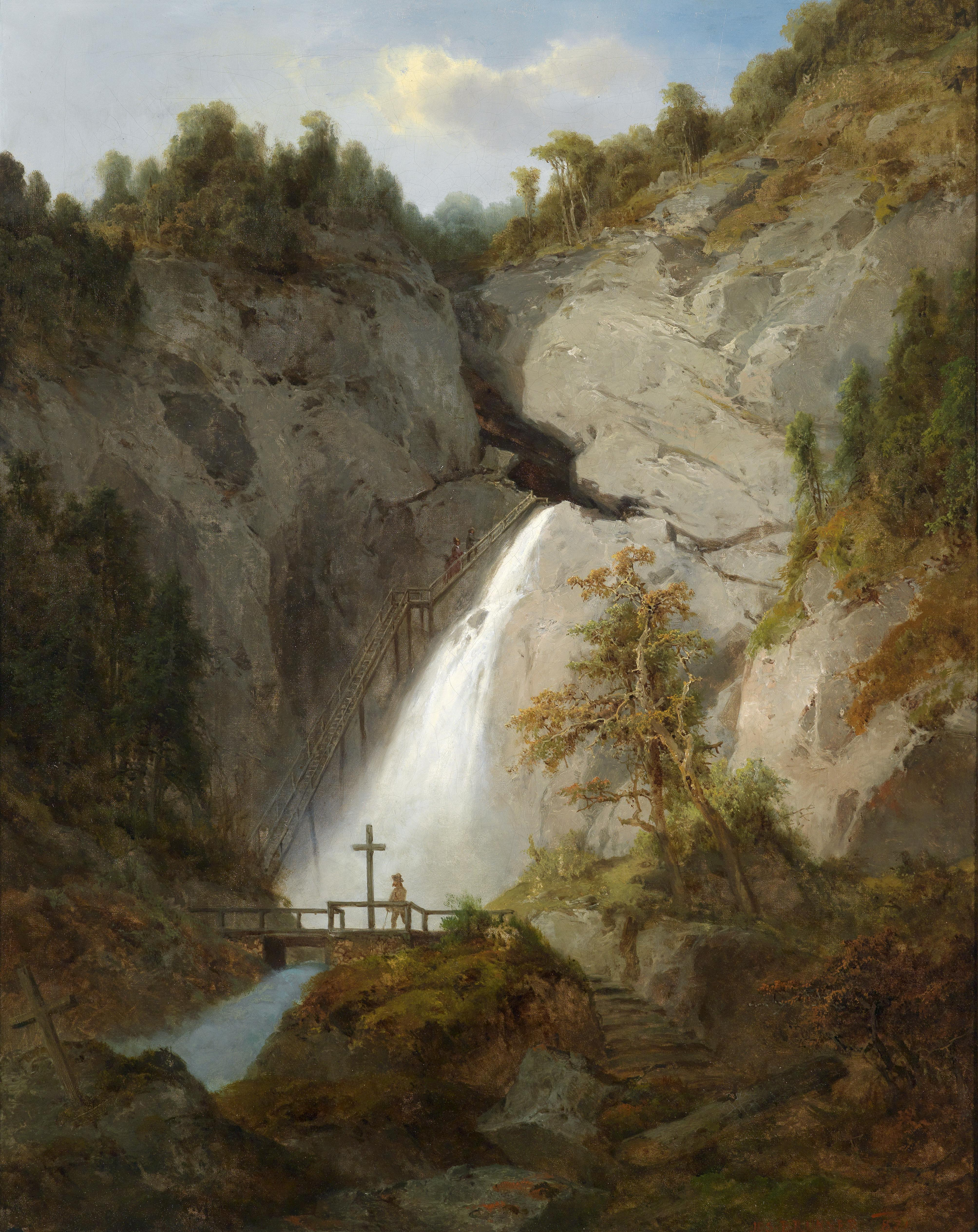 Der Wasserfall beim Toten Weib zwischen Mürzsteg und Freintitle QS:P1476,de:"Der Wasserfall beim Toten Weib zwischen Mürzsteg und Frein" label QS:Lde,"Der Wasserfall beim Toten Weib zwischen Mürzsteg und Frein"